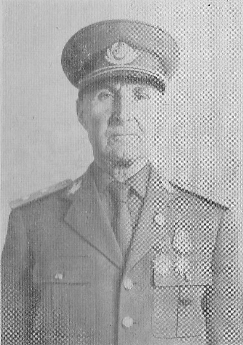 Generalul român Leonard Mociulschi (1889-1979)